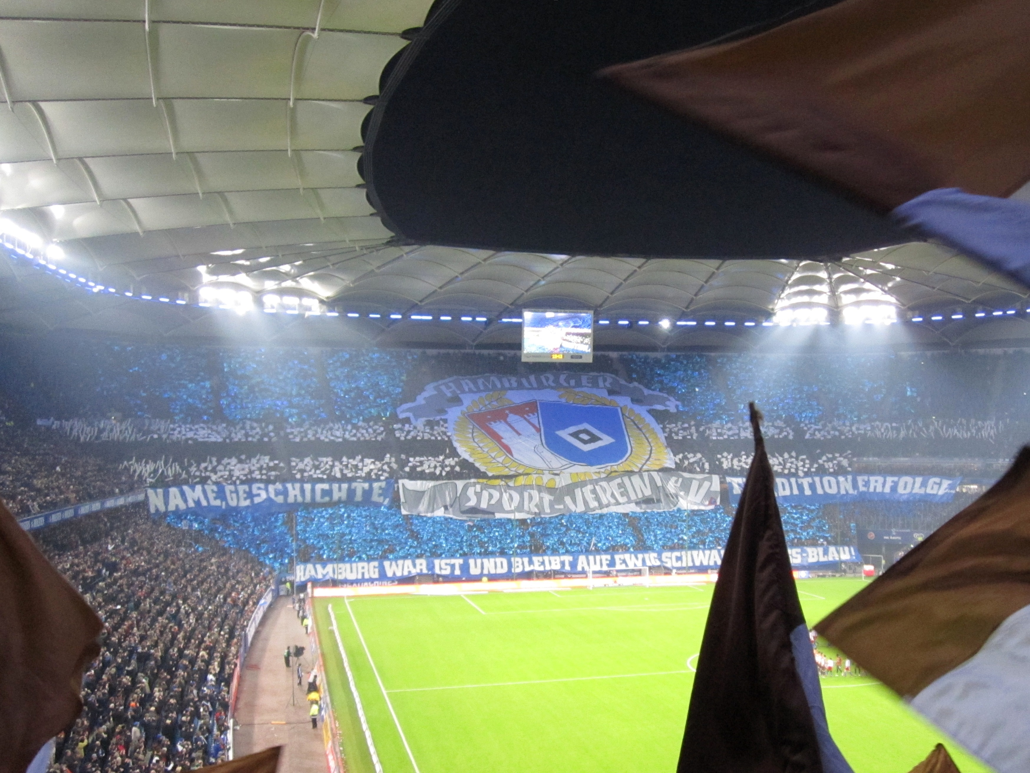 Hamburger Stadtderby HSV-St. Pauli am 16. Feb. 2011 in der Imtech Arena